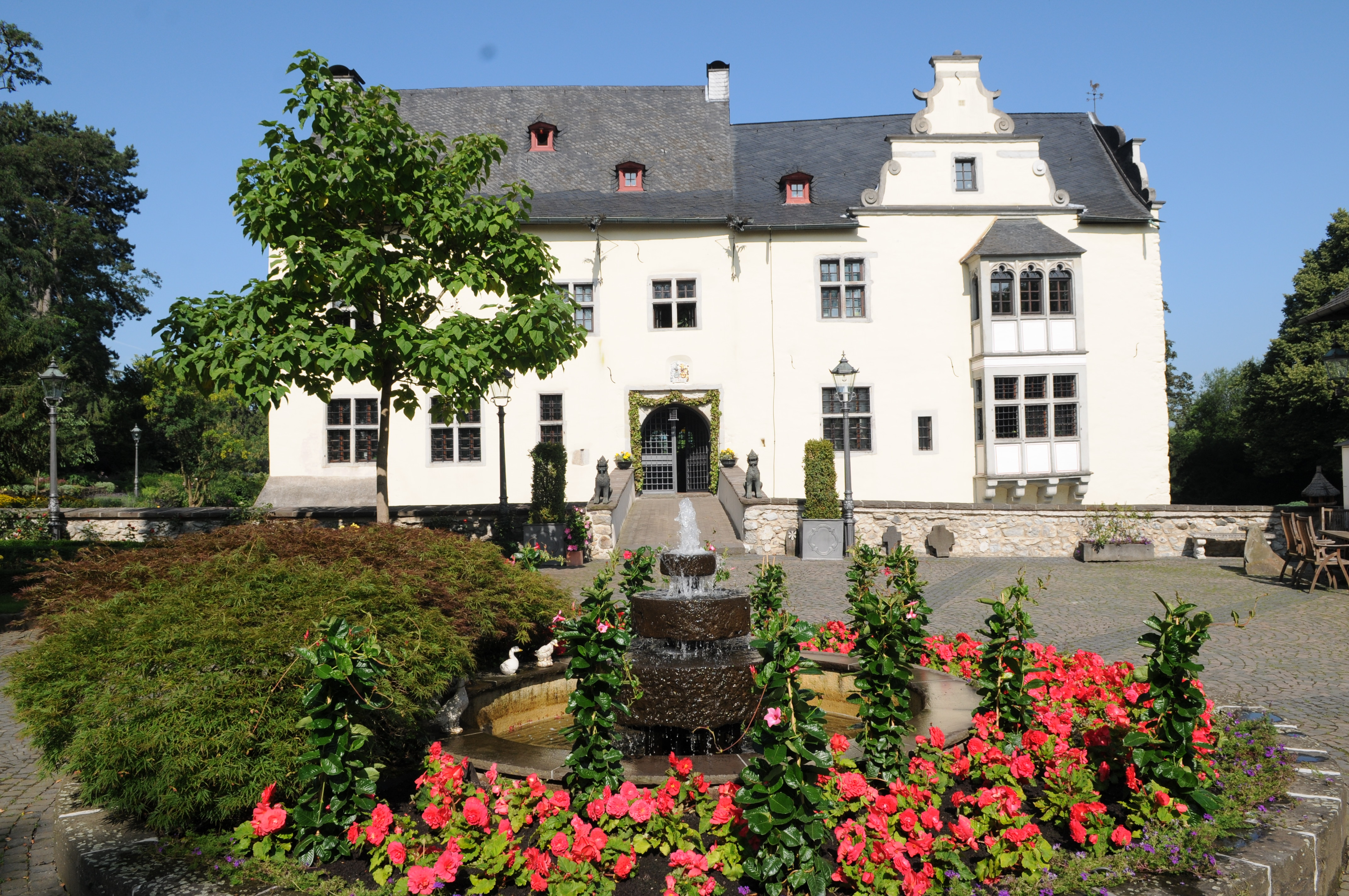 Eingangseite zur Wasserburg Odenhausen.